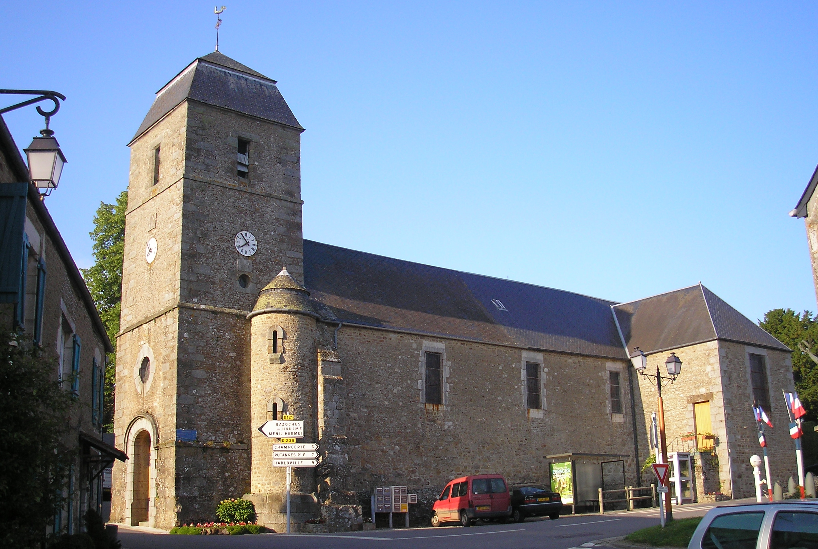 Rabodanges (Normandie, France). L'église Saint-Hermeland.